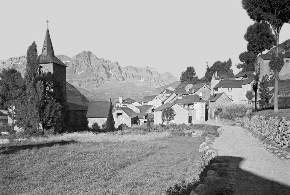 Imatge